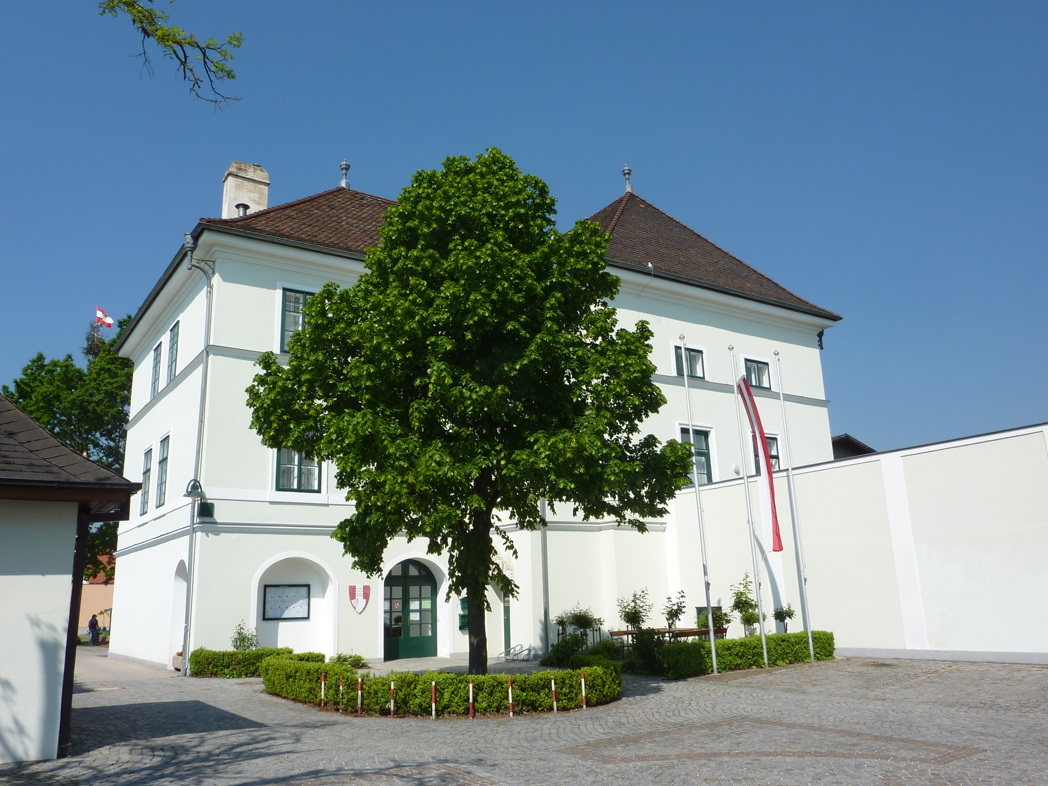 ehem. Schloss, Gemeindeamt, Karlstetten, Niederösterreich